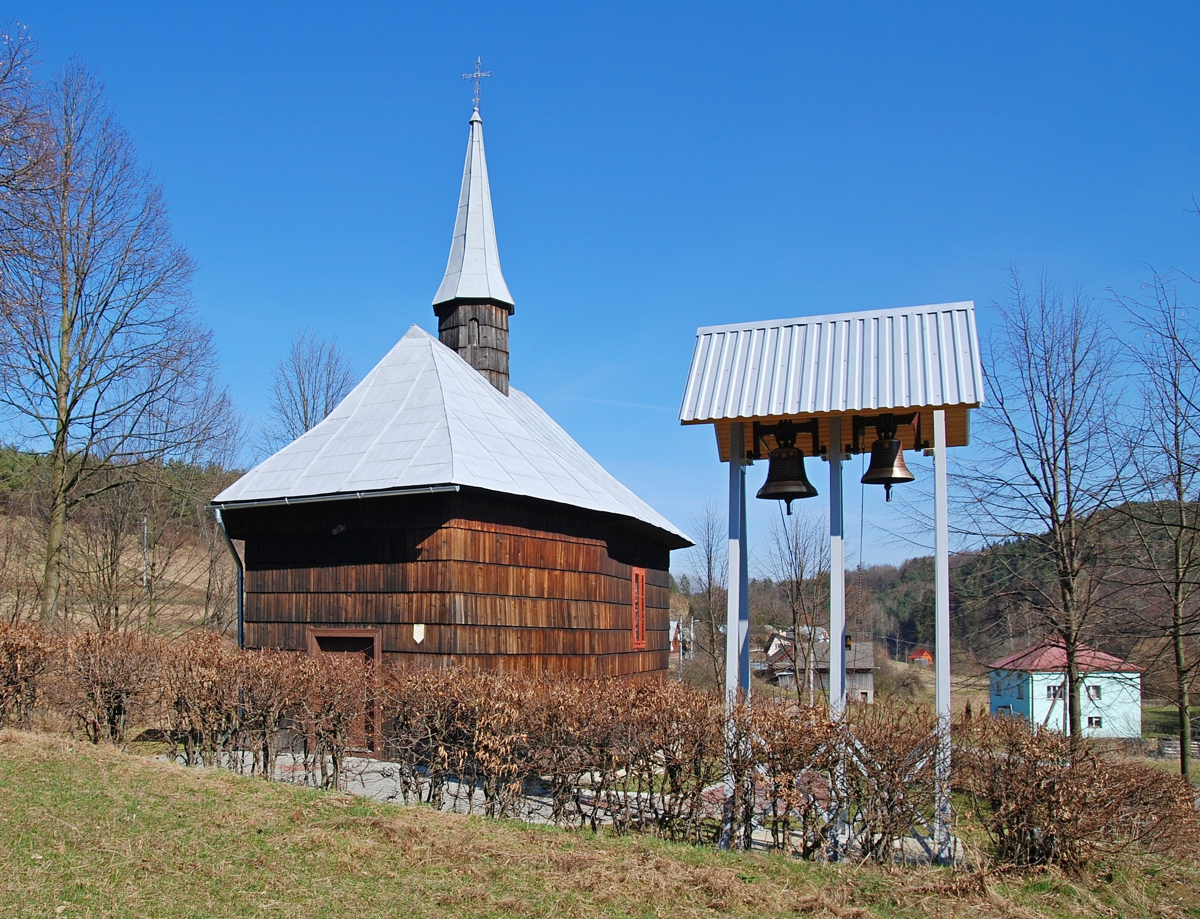 wieś Obarzym